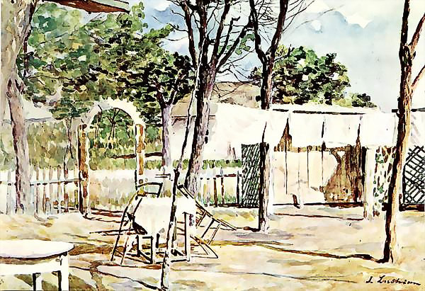 Birt fără muşterii